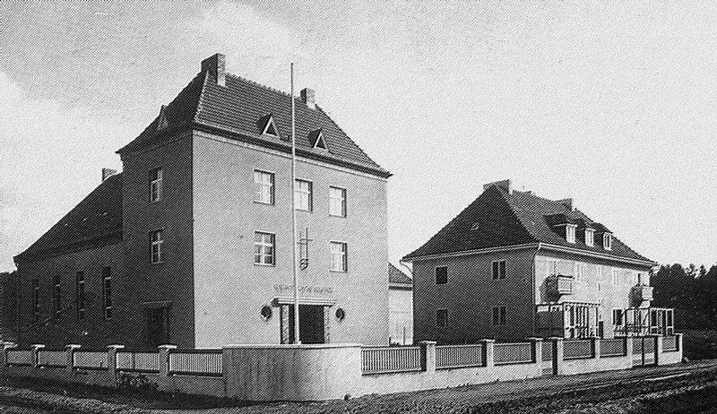 Kościół nowoapostolski w Gryficach (Polska)